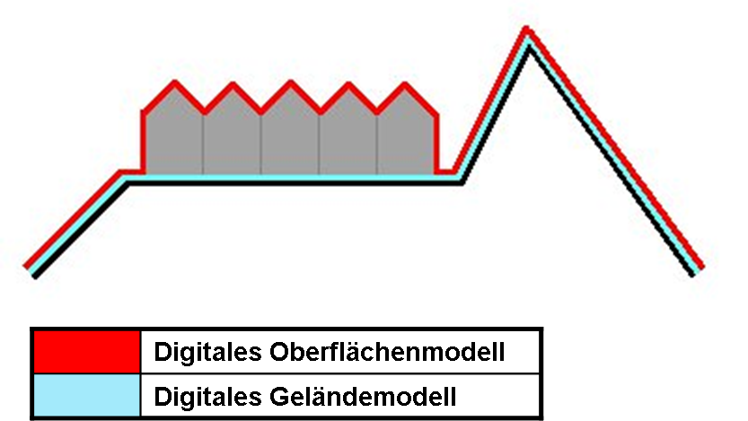 Repräsenation der Oberflächen eines Digitales Oberflächenmodells und eines Digitalen Geländemodells